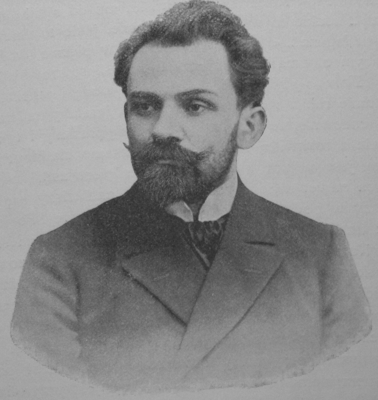 Stefan Żeromski (1864-1925), Polish writer.